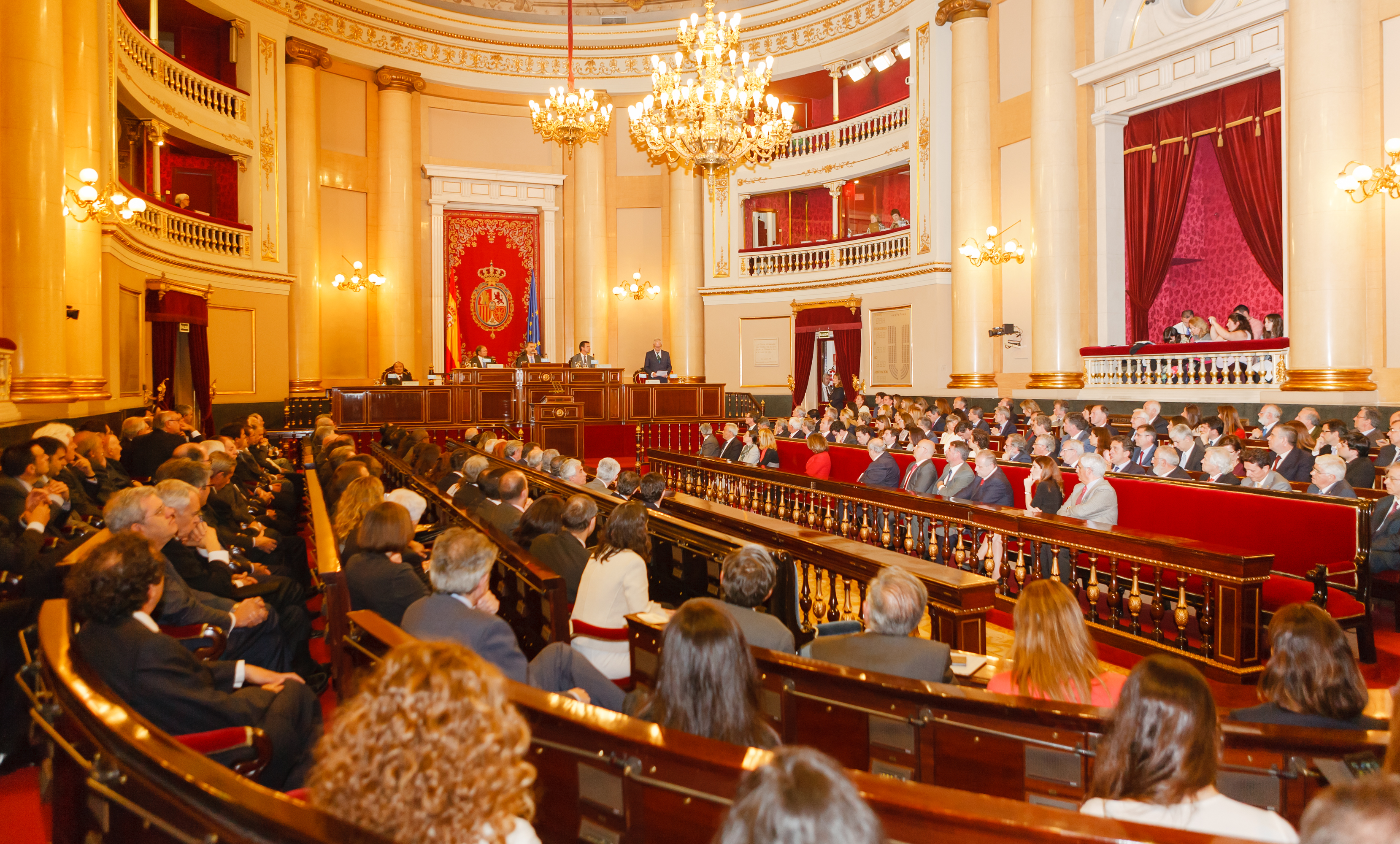 Acto Conmemorativo del 150 Aniversario de la UIT